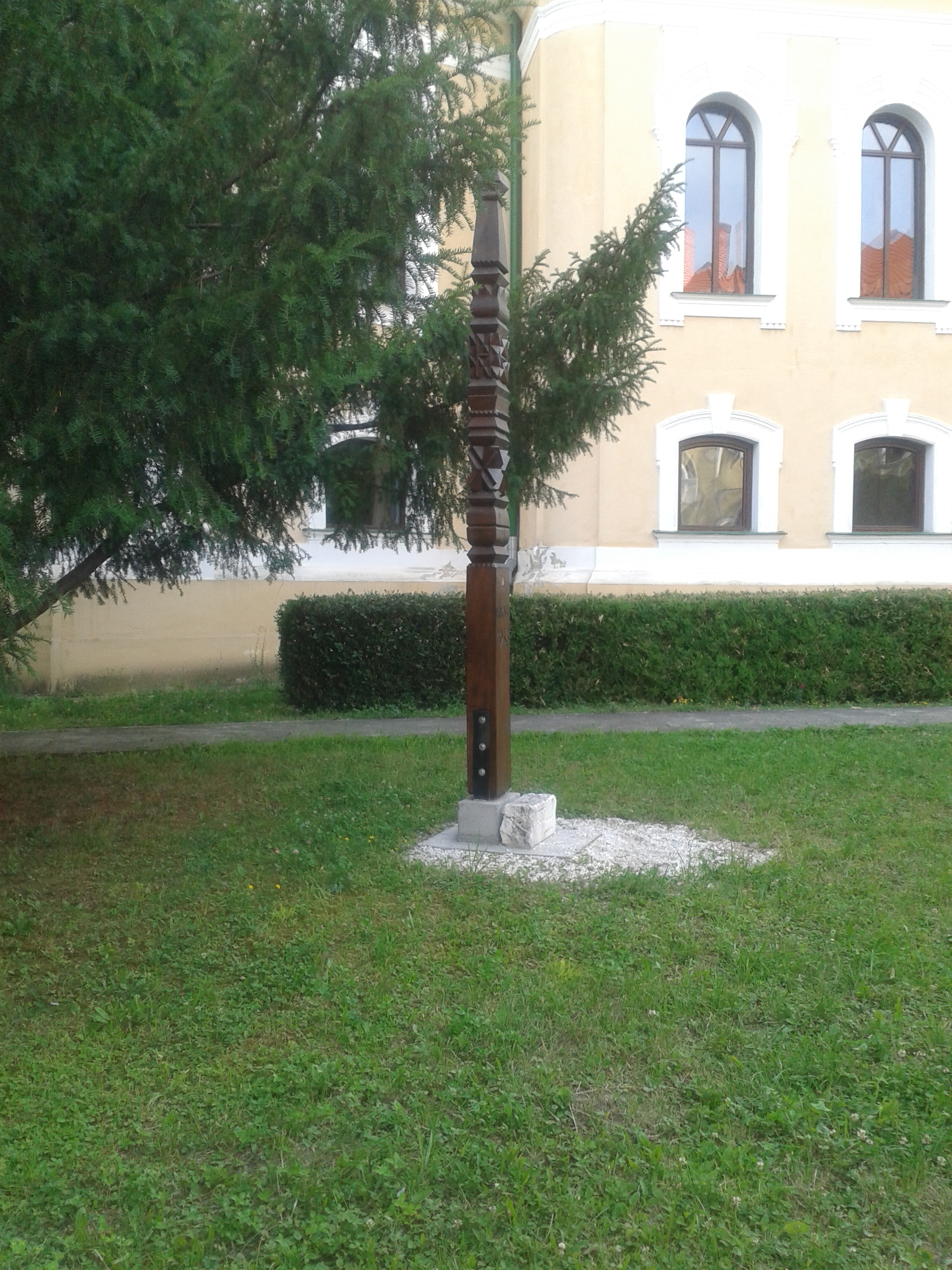 Obelisc în curtea Bisericii Reformate din Zalău.